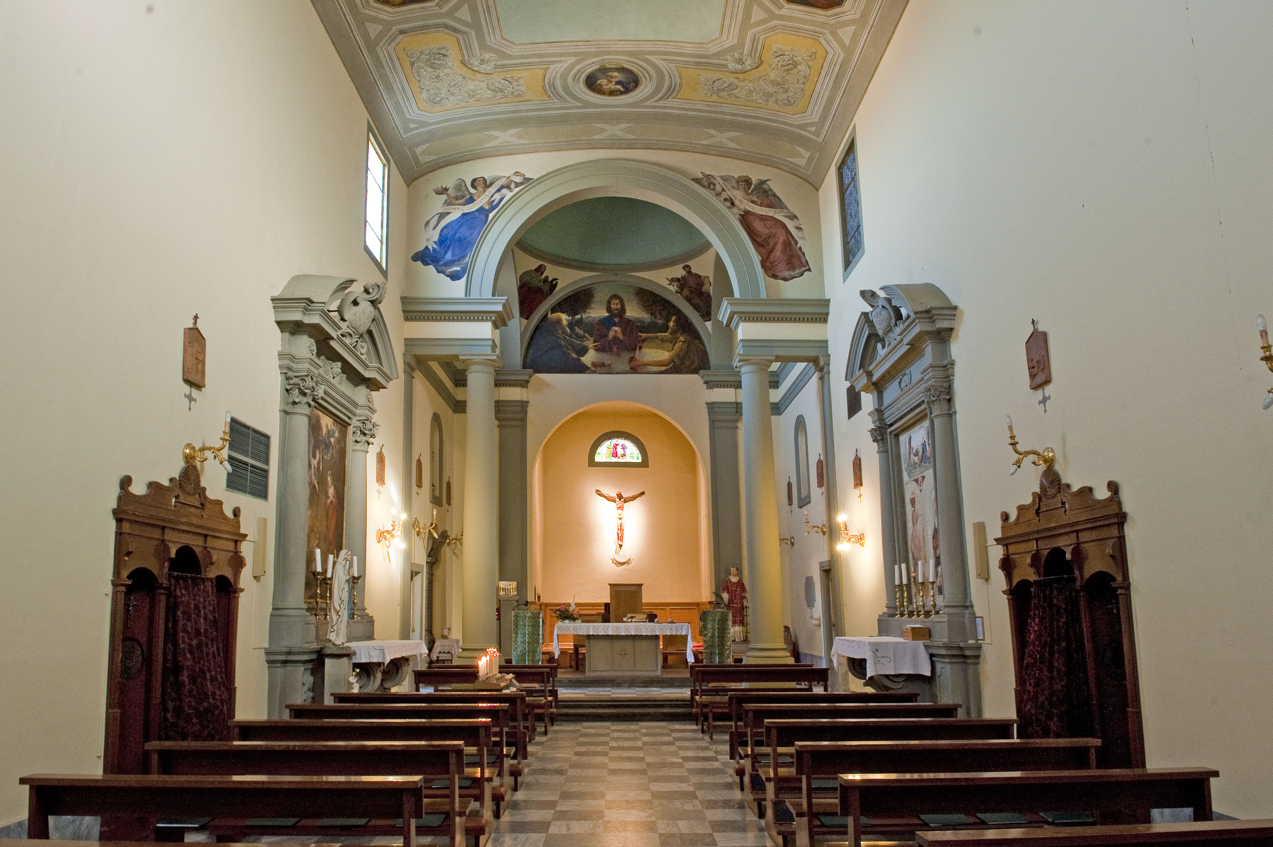 Interno della chiesa di San Lorenzo a Monterappoli (Empoli)